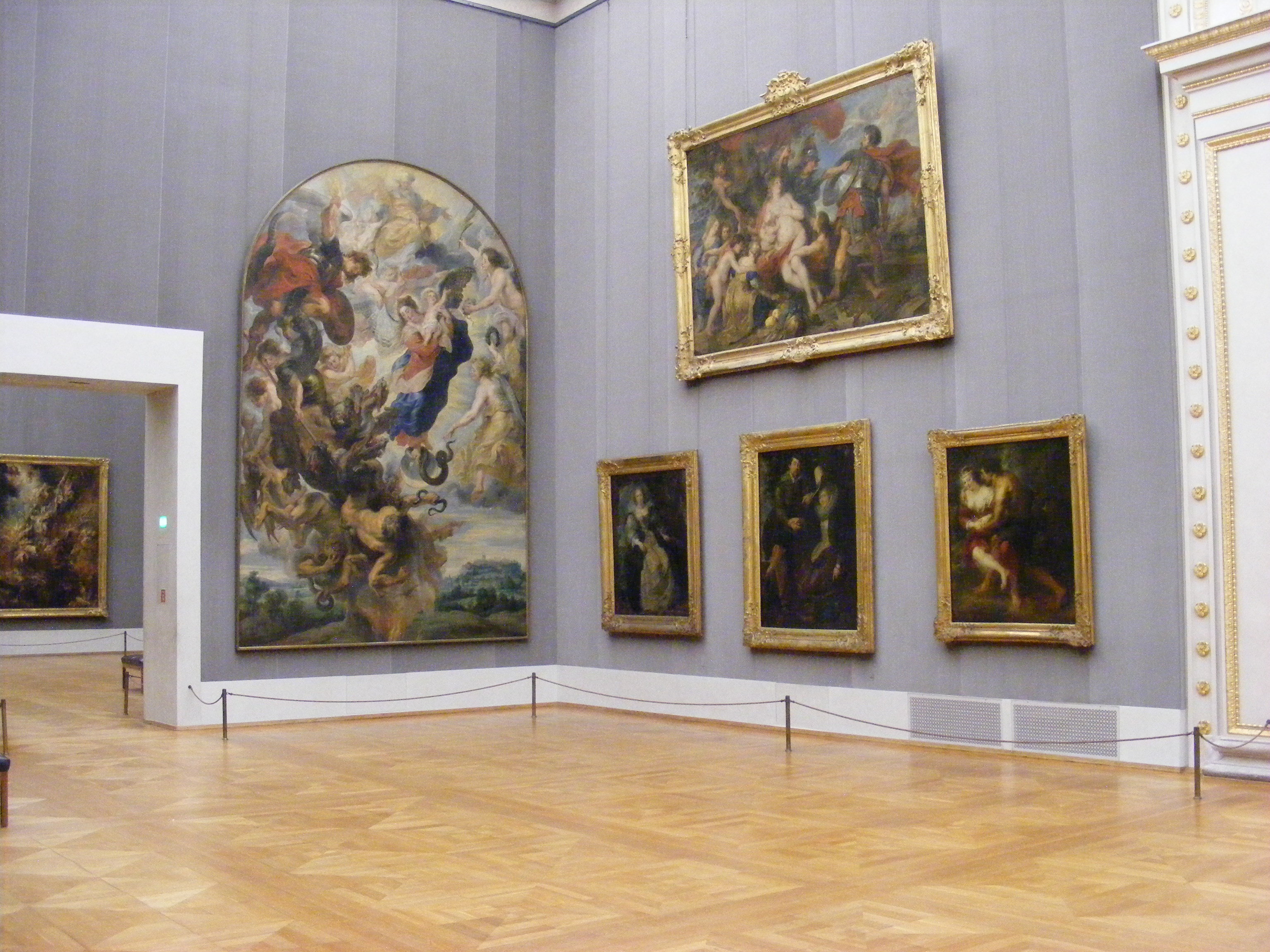 Teilansicht des Rubenssaals in der Alten Pinakothek München (Raum VII) wieth paintings by Peter Paul Rubens